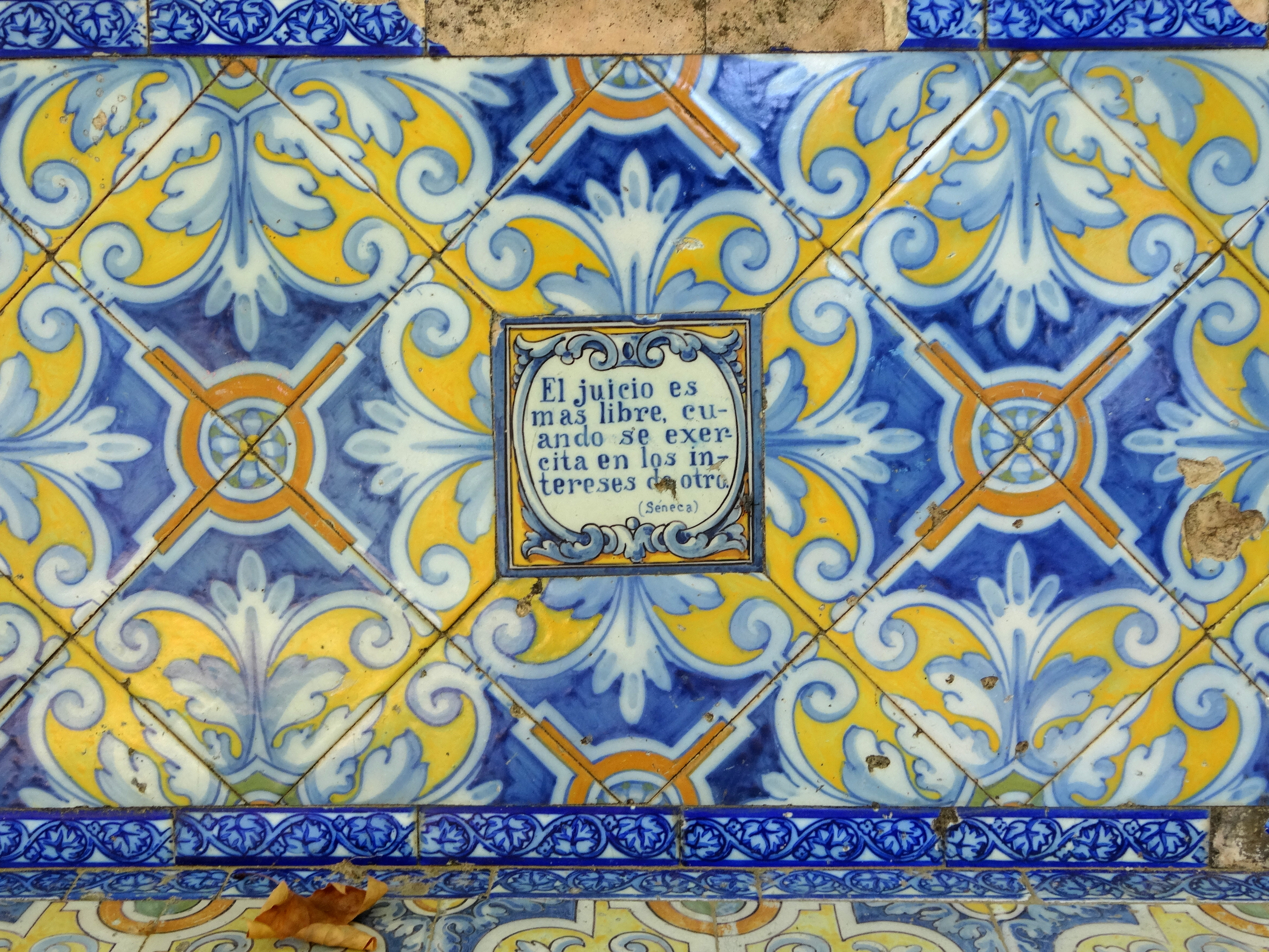 Jardines de la Agricultura, Córdoba (España).